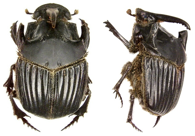 Familie: Scarabaeidae Grösse: 25 mm Verbreitung: Brasilien, Franz. Guiana, Venezuela Fundort: Brasilien, Para Rio Arapiuns leg. Kesseltr.; det. U.Schmidt Foto: U.Schmidt, 2006